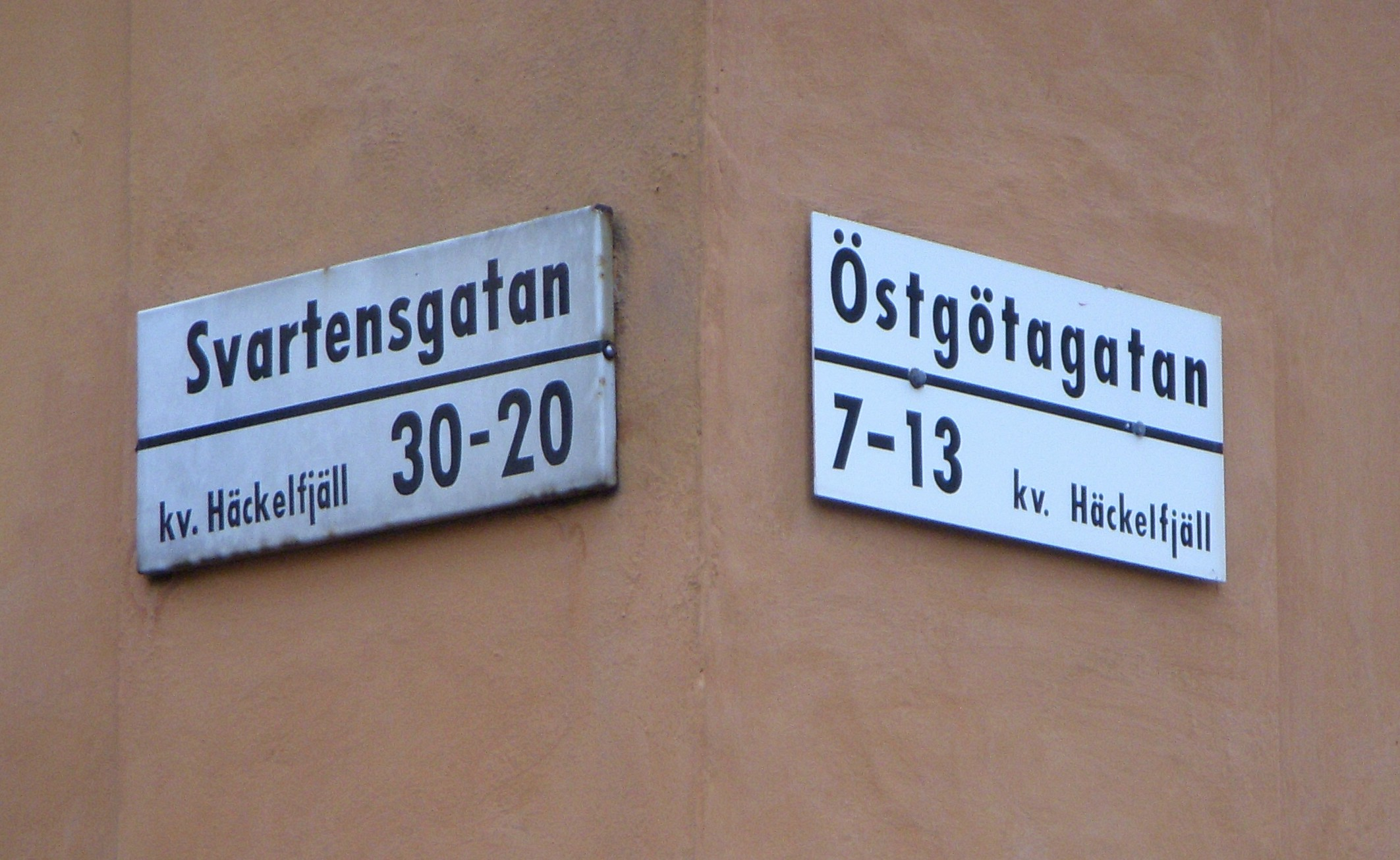 Kvarteret Häckelfjäll på Södermalm i Stockholm